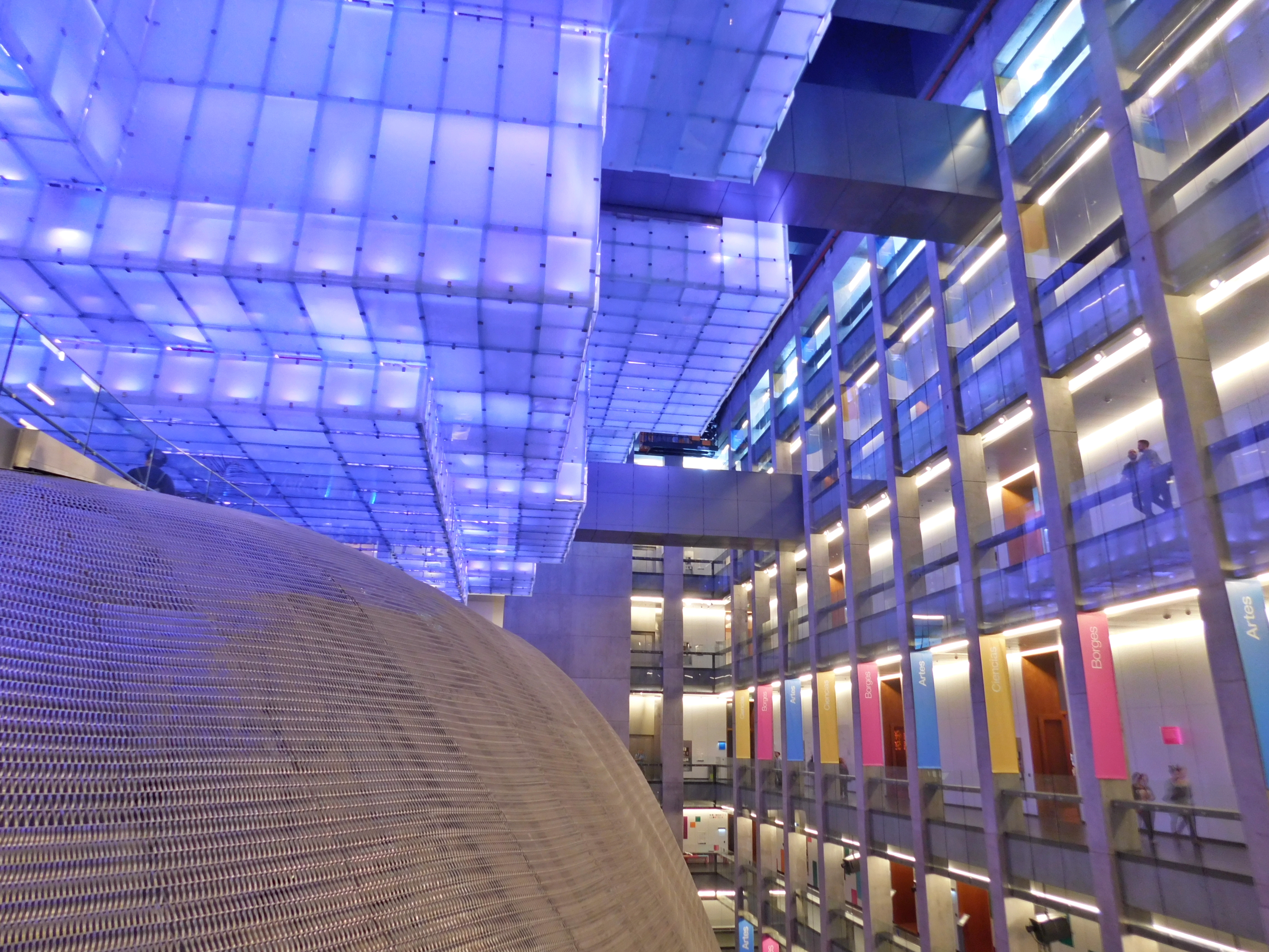 Centro Cultural Kirchner, vista exterior de la sala sinfónica conocida como Ballena Azul.